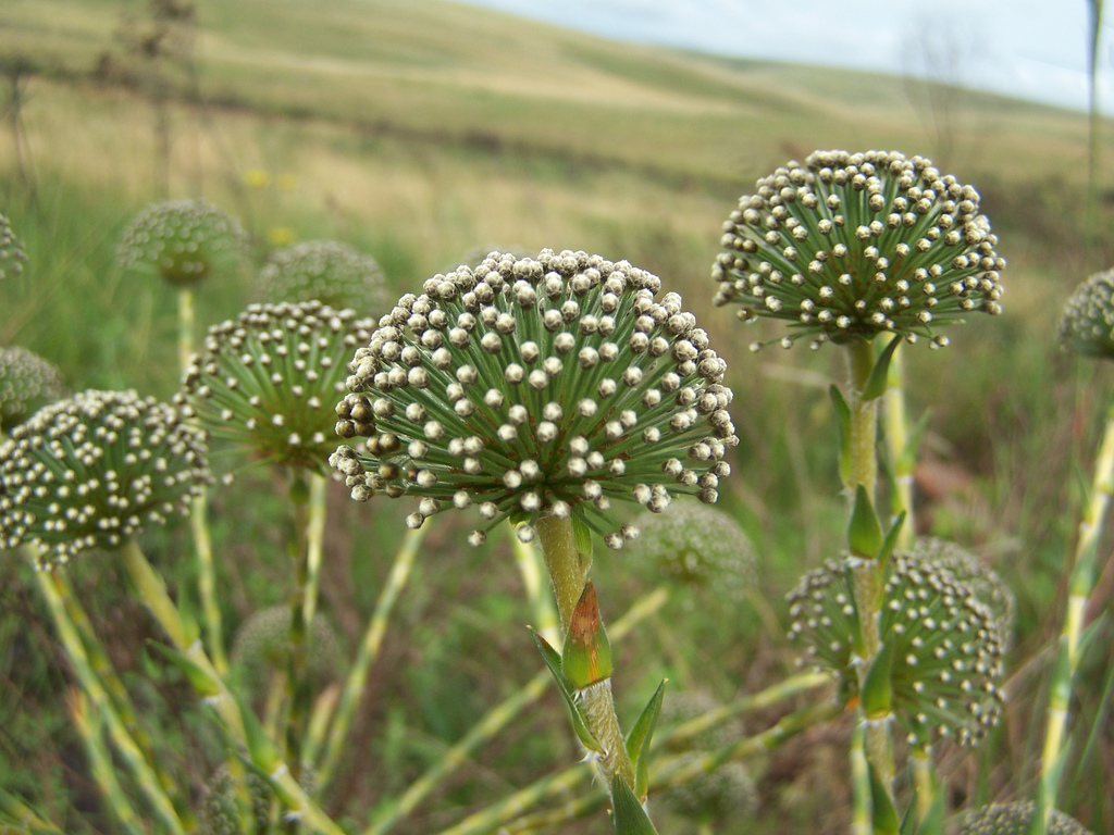 Serra da CanastraSempre Viva